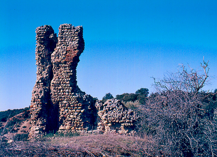 Ruinas del Catillo de Santiesteban